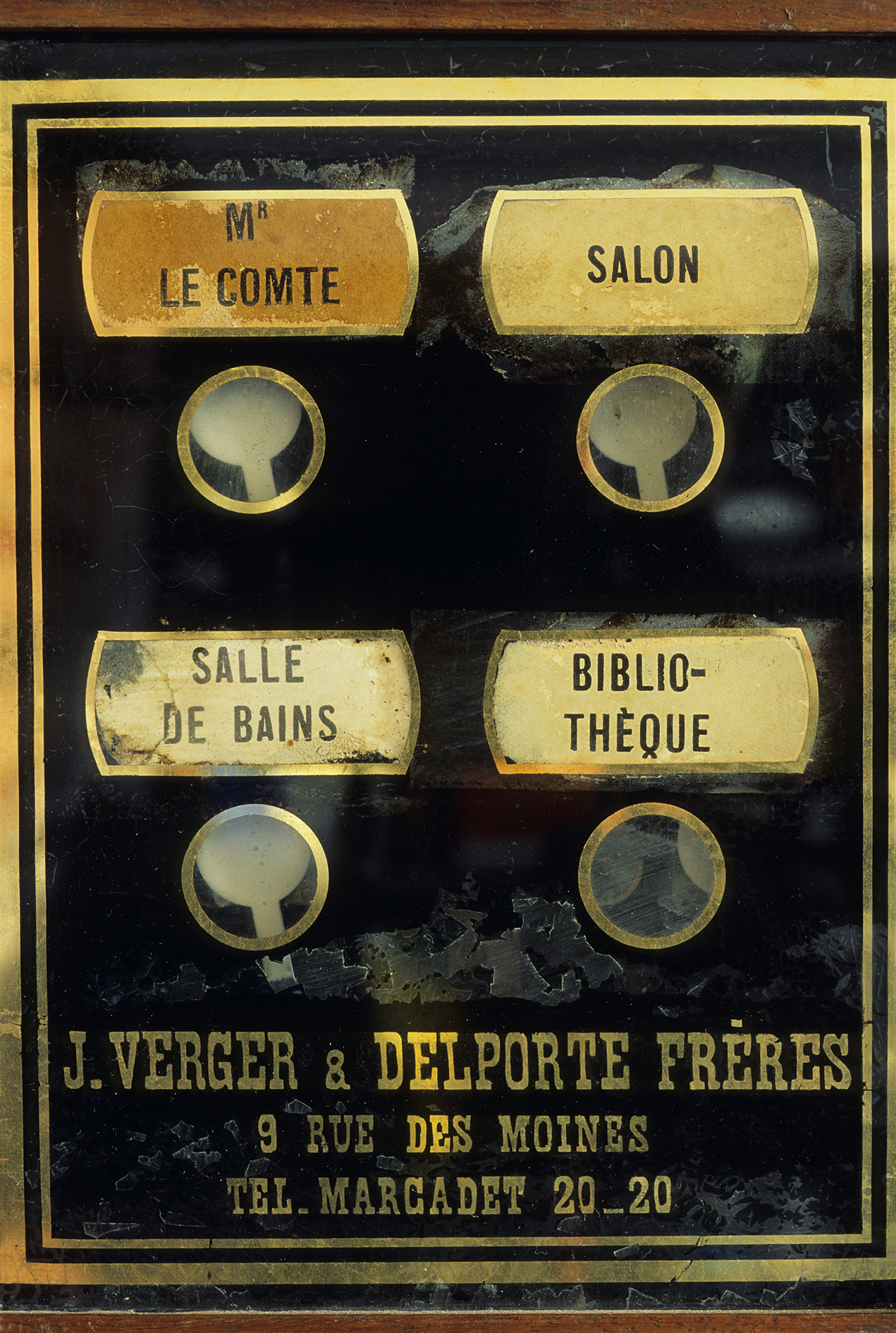 Les chateaux et manoirs de Bourgogne, le chateau de Menou, ici gros plan du systeme (mecanique) d’appel des domestiques, la rue des Moines est une rue du XVIIe arrondissement de Paris (quartier des Batignolles), le numero de telephone de l’entreprise parisienne qui a pose cette armoire, marcadet 20-20, est constitue du nom du central de rattachement suivi de deux groupes de deux chiffres, le premier groupe correspondant au central, le second a l’abonne, ces indicatifs telephoniques ont existe des 1912, photo prise apres avoir obtenu l’autorisation du proprietaire, commune de Menou, Nievre, France, Europe.